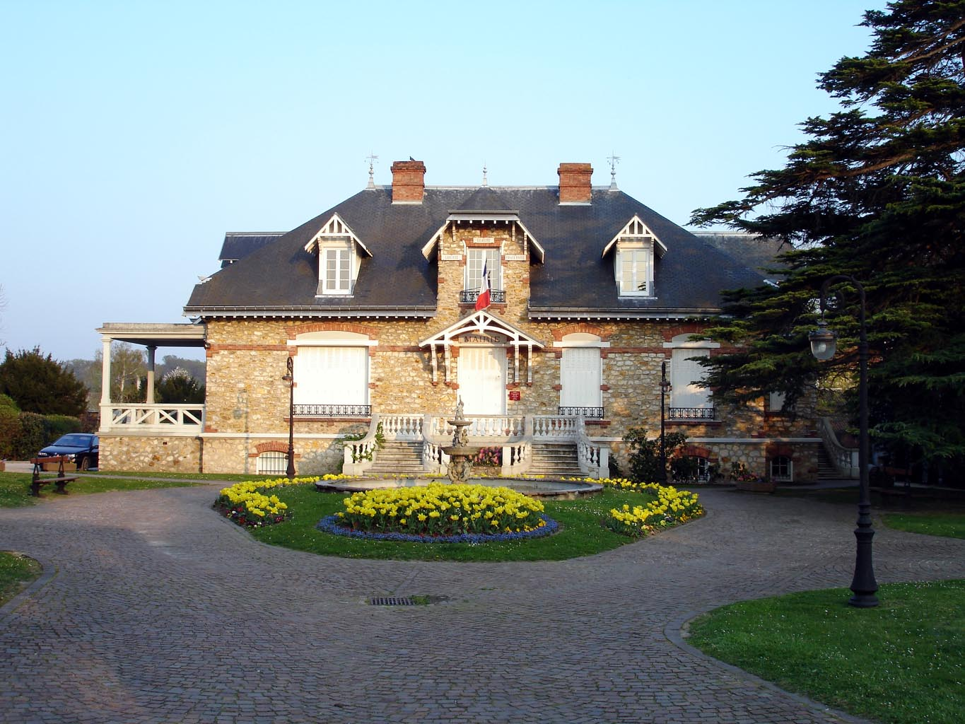 Hôtel-de-ville de Saint-Prix (Val-d'Oise), France